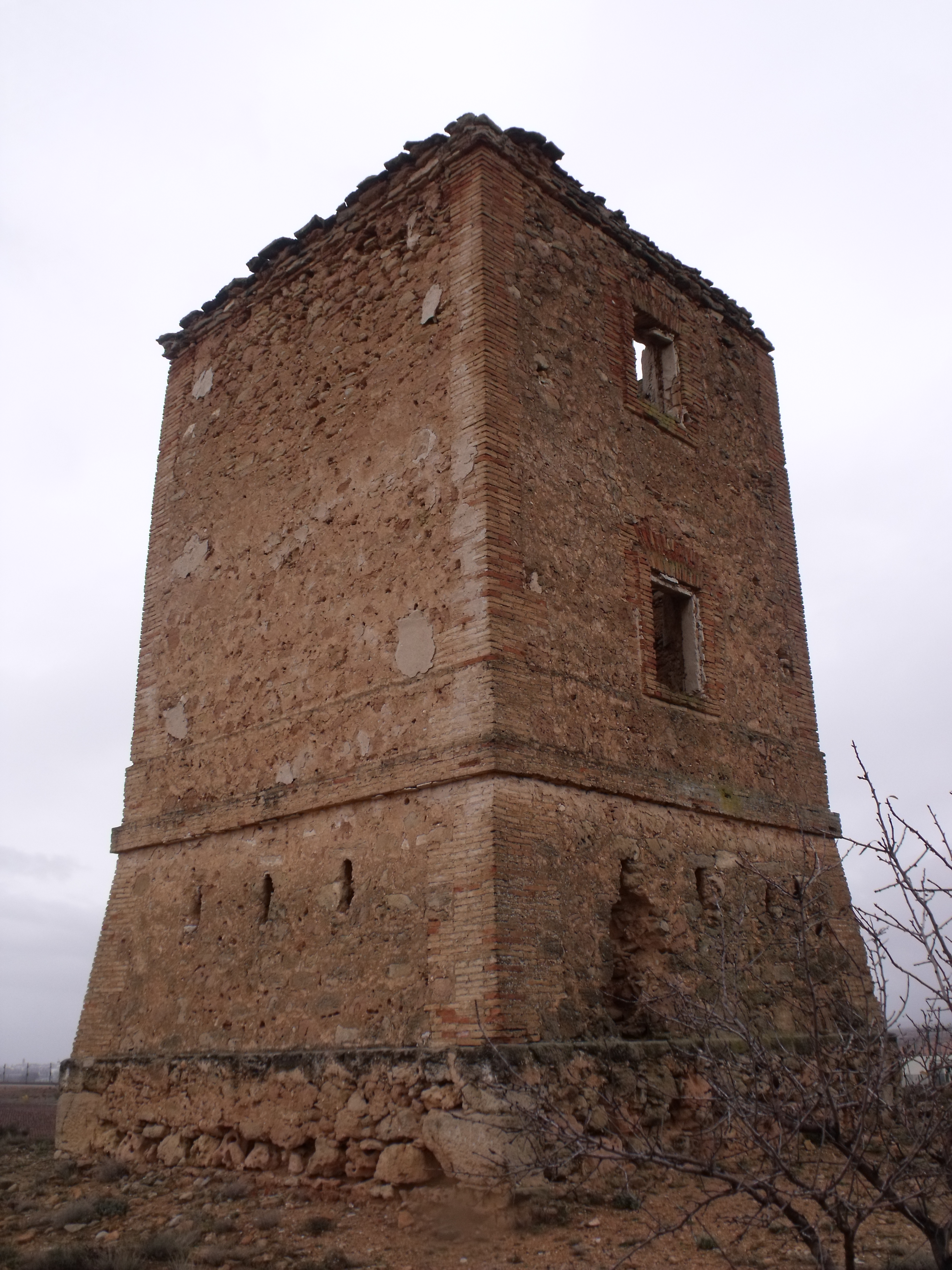 Vistas diversas de la torre de la Jedrea, en San Antonio de Requena